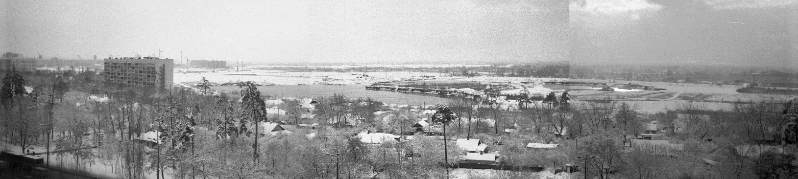 Харківський масив, ЗЕМ (майбутнє озеро Сонячне), 1987